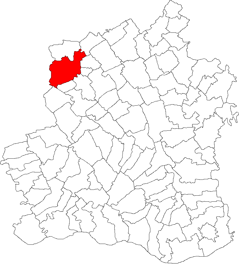 Categorie:Hărţi ale judeţului Teleorman